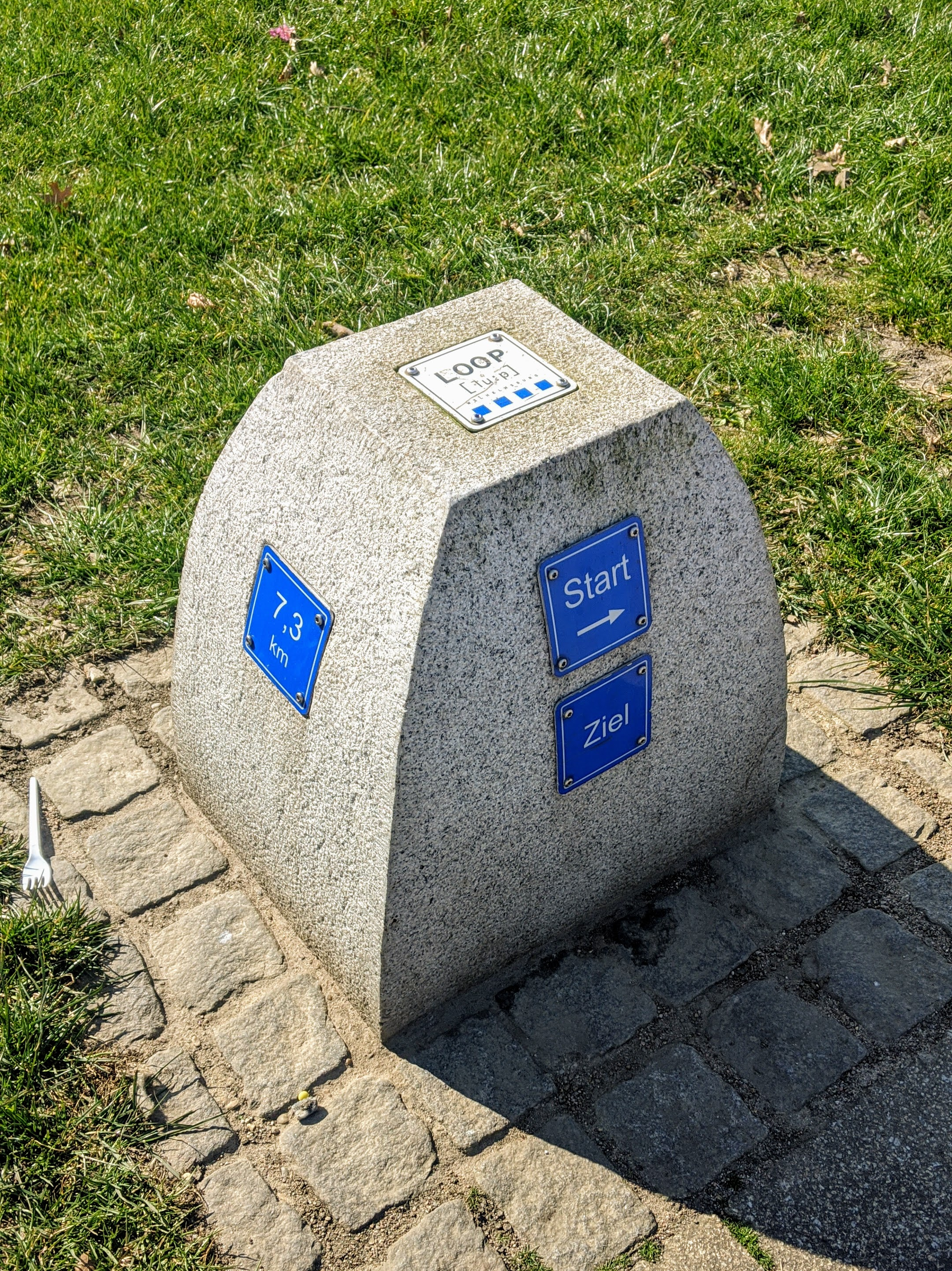 Meilenstein am Freizeitradweg "Loop" in Hamburg-Wilhelmsburg